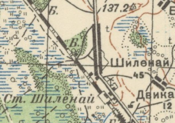 Деревня Шиленай. Фрагмент топографической карты РККА 1937-1938 гг. Масштаб: 1:100000)